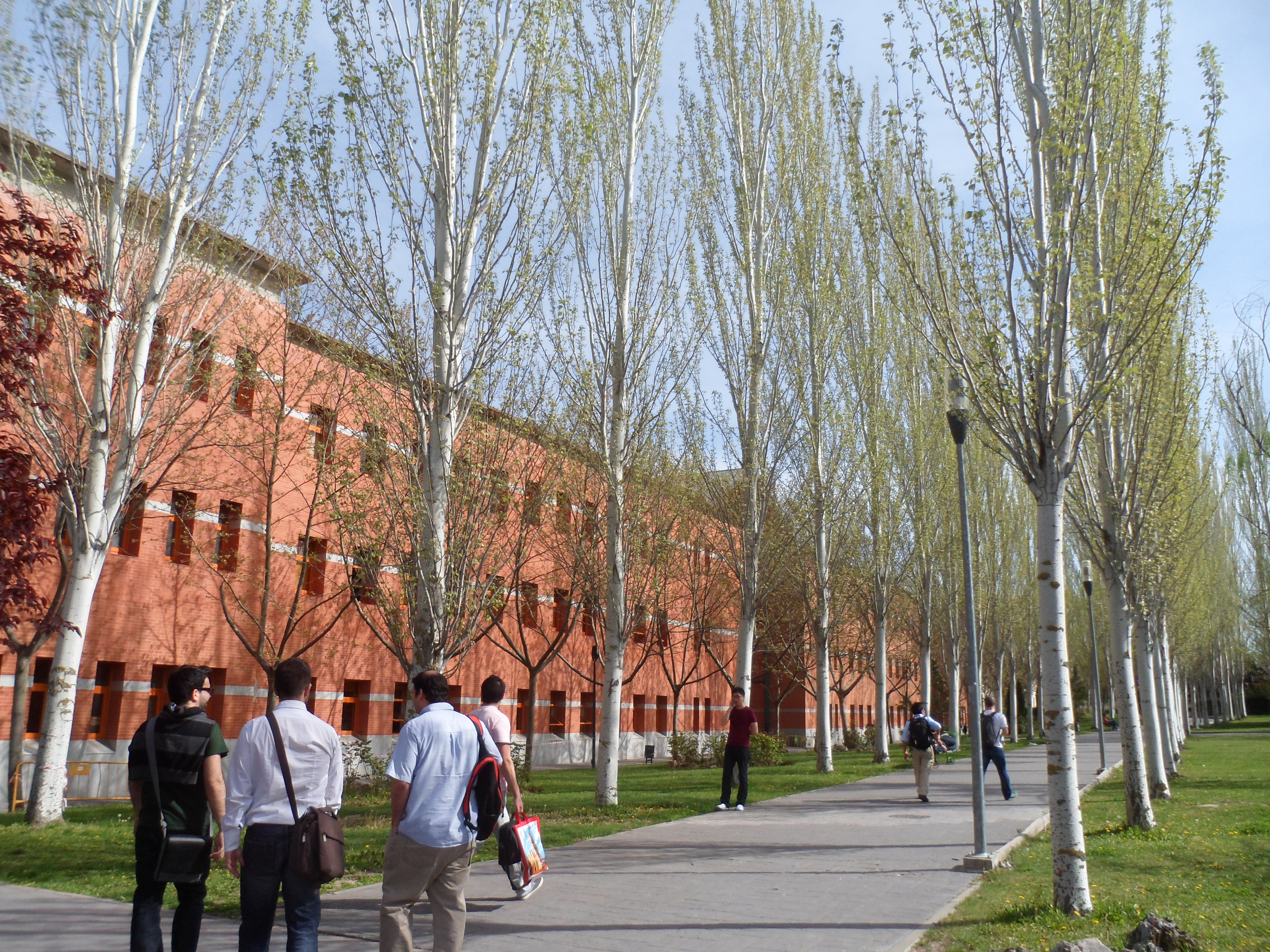 Facultad de Ciencias Jurídicas y Sociales de la Universidad Rey Juan Carlos. Campus Vicálvaro, Madrid, España.